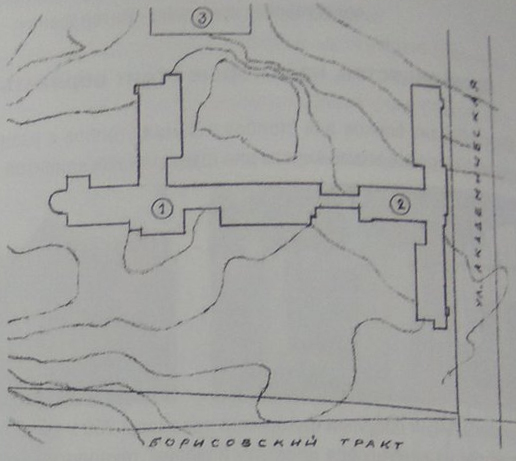 План размяшчэння будынкаў Палітэхнікума (1929 г.): 1 - галоўны навучальны корпус, 2 - інтэрнат, 3 - сталовая